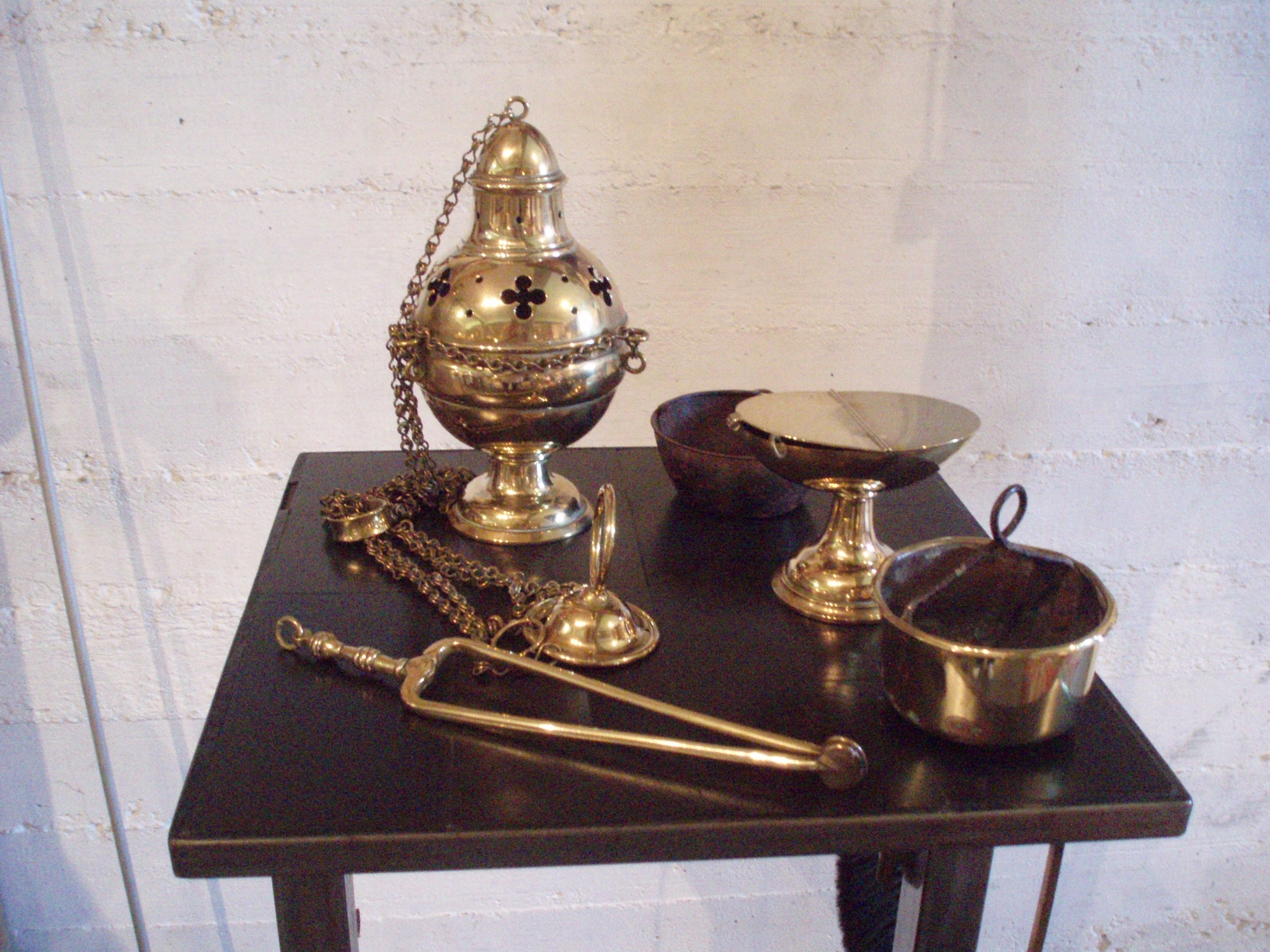 Thurible and incense boat in museum Kijk-je kerk-kunst, Gennep, Netherlands